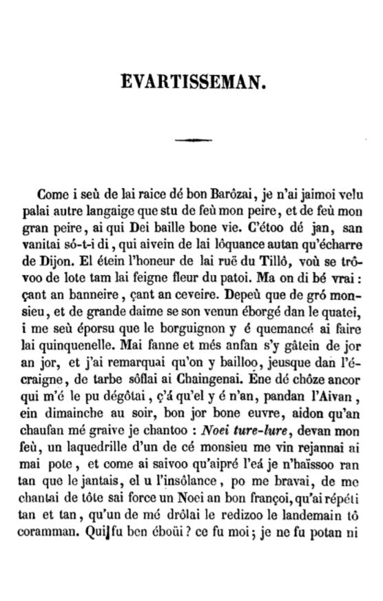 Début de l'Avertissement aux Evaireman de lai Peste d'Aymé Piron